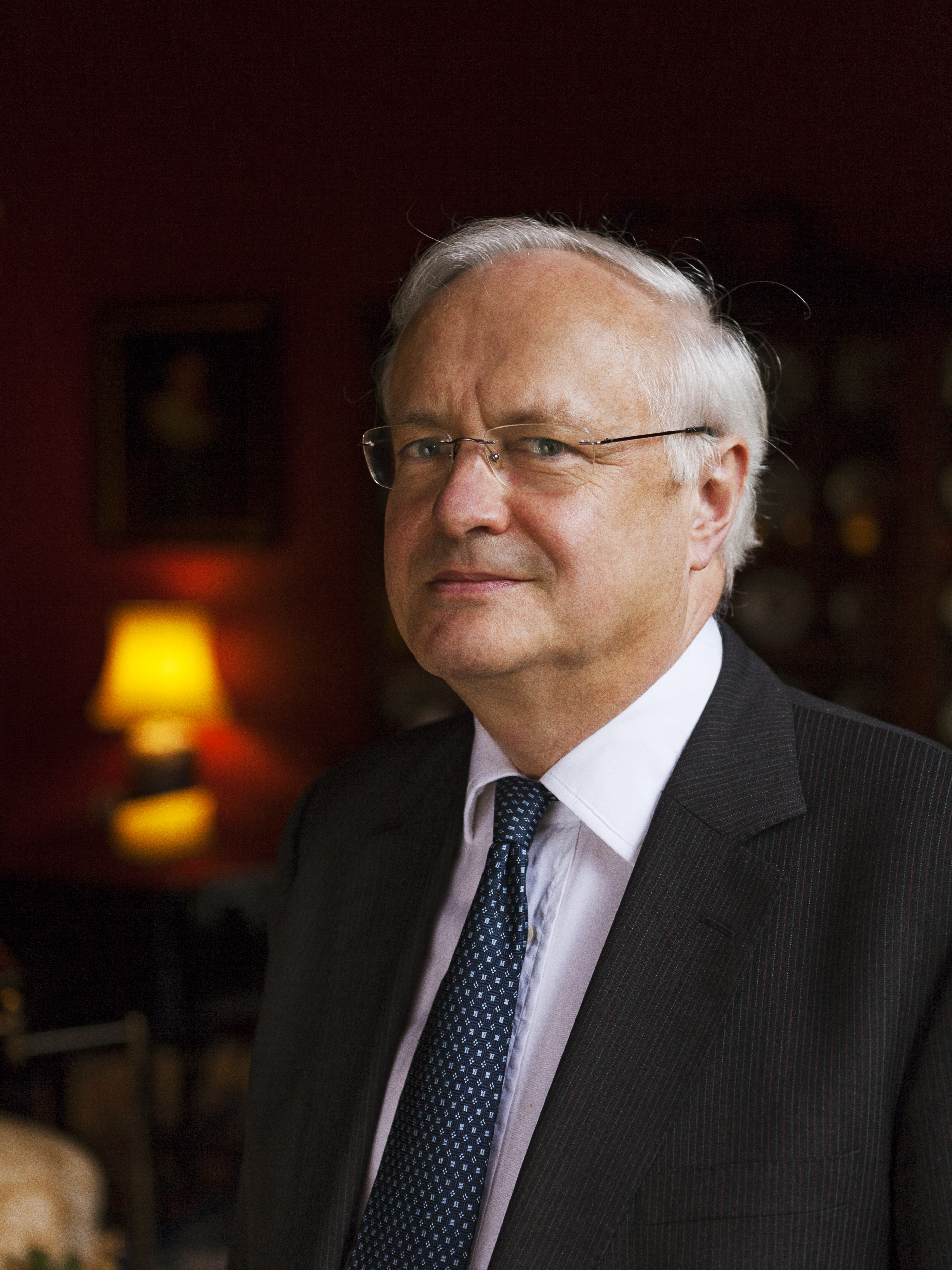 Christopher Dobson, hoogleraar chemische en structurele biologie aan de Universiteit van Cambridge (Verenigd Koninkrijk) krijgt de Dr. H.P. Heinekenprijs voor de Biochemie en Biofysica 2014 voor het ontrafelen van hoe eiwitten in het lichaam zich verkeerd kunnen vouwen en hoe dat kan leiden tot ouderdomsziekten zoals Alzheimer, Parkinson en diabetes. Bij gebruik van de foto's is naamsvermelding van de fotograaf verplicht: Jussi Puikkonen/KNAW.